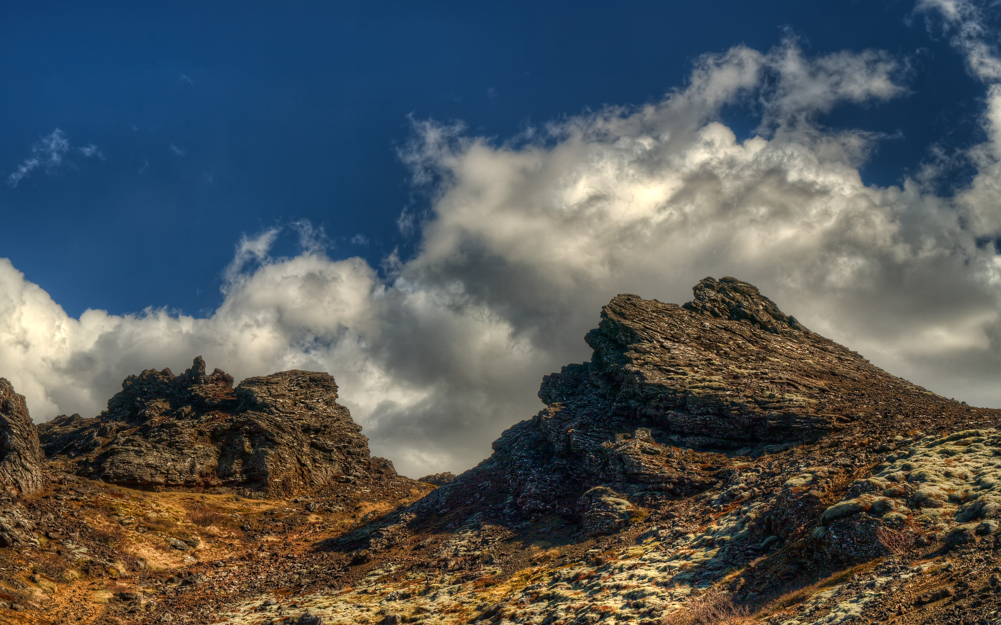 Búrfell 2